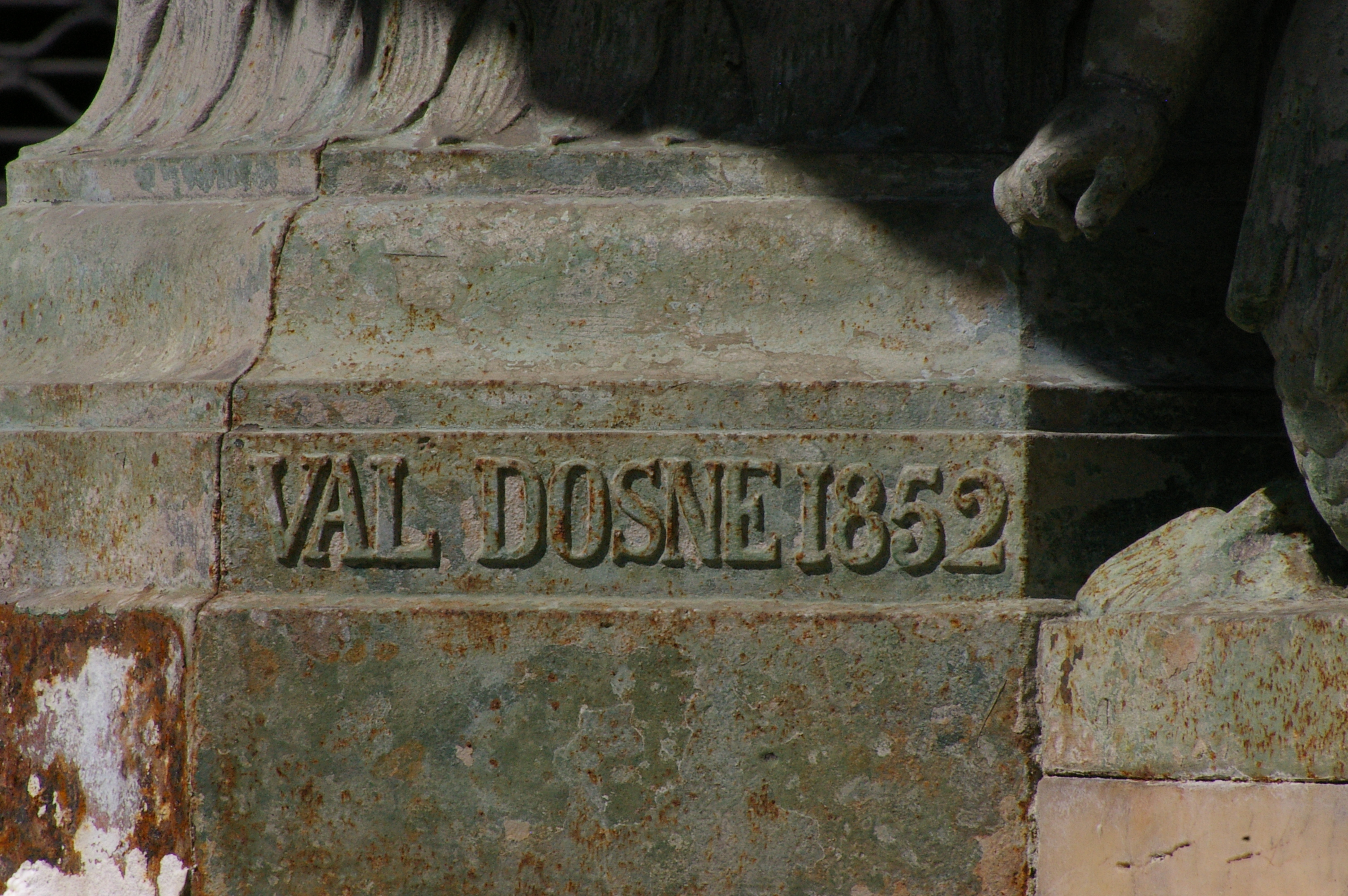 Marque de fondeur "VAL DOSNE 1852" / signature de la Fonderie d'art Val d'Osne sur la fontaine de la place Salengro à Toulouse